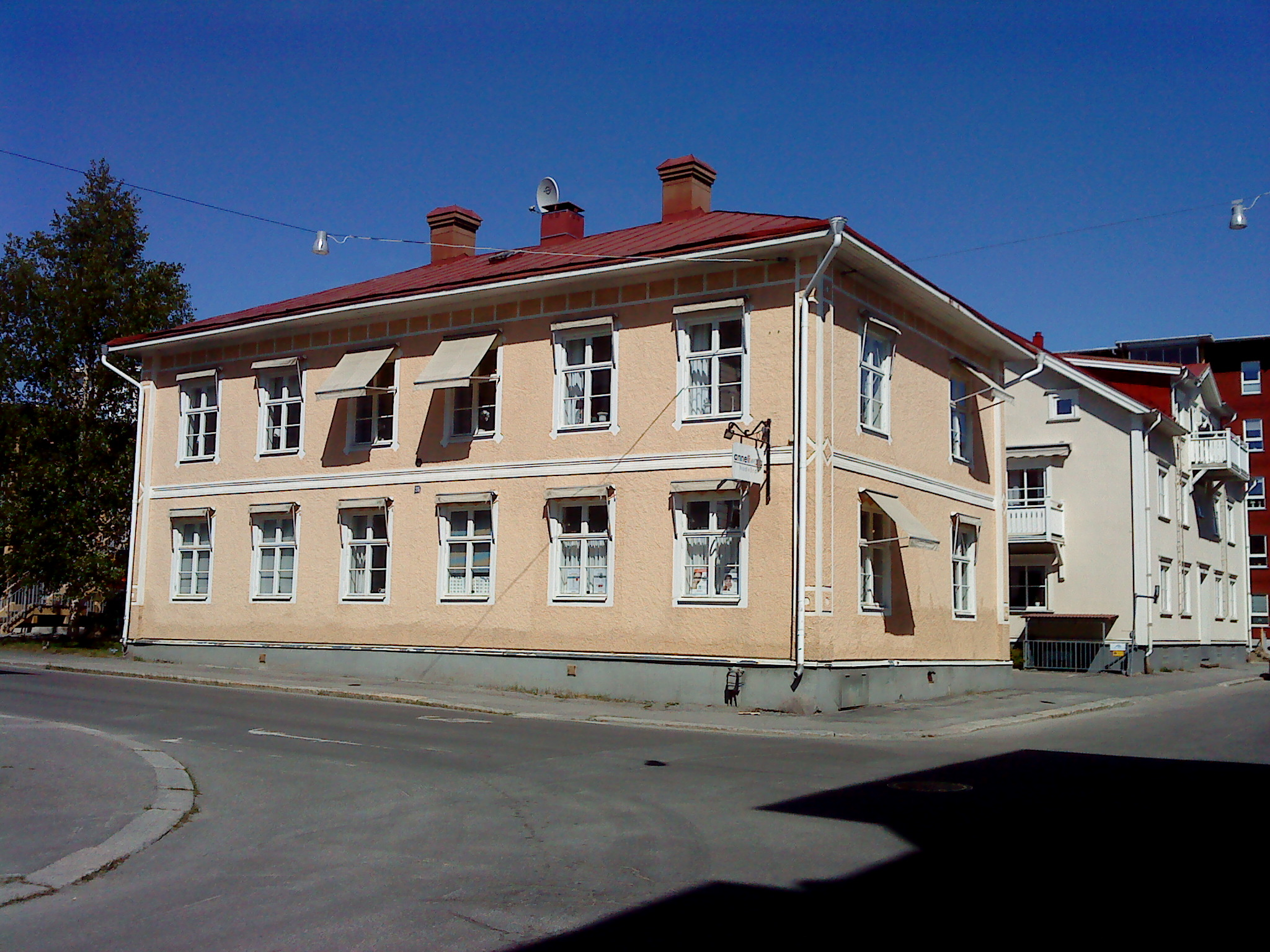 Garvare Anderssons gård från 1857 i centrala Skellefteå. Byggnadsminne 1983.